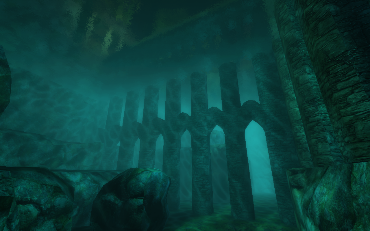 Screenshot zur Demonstration der Shadertechnologien von Cube2